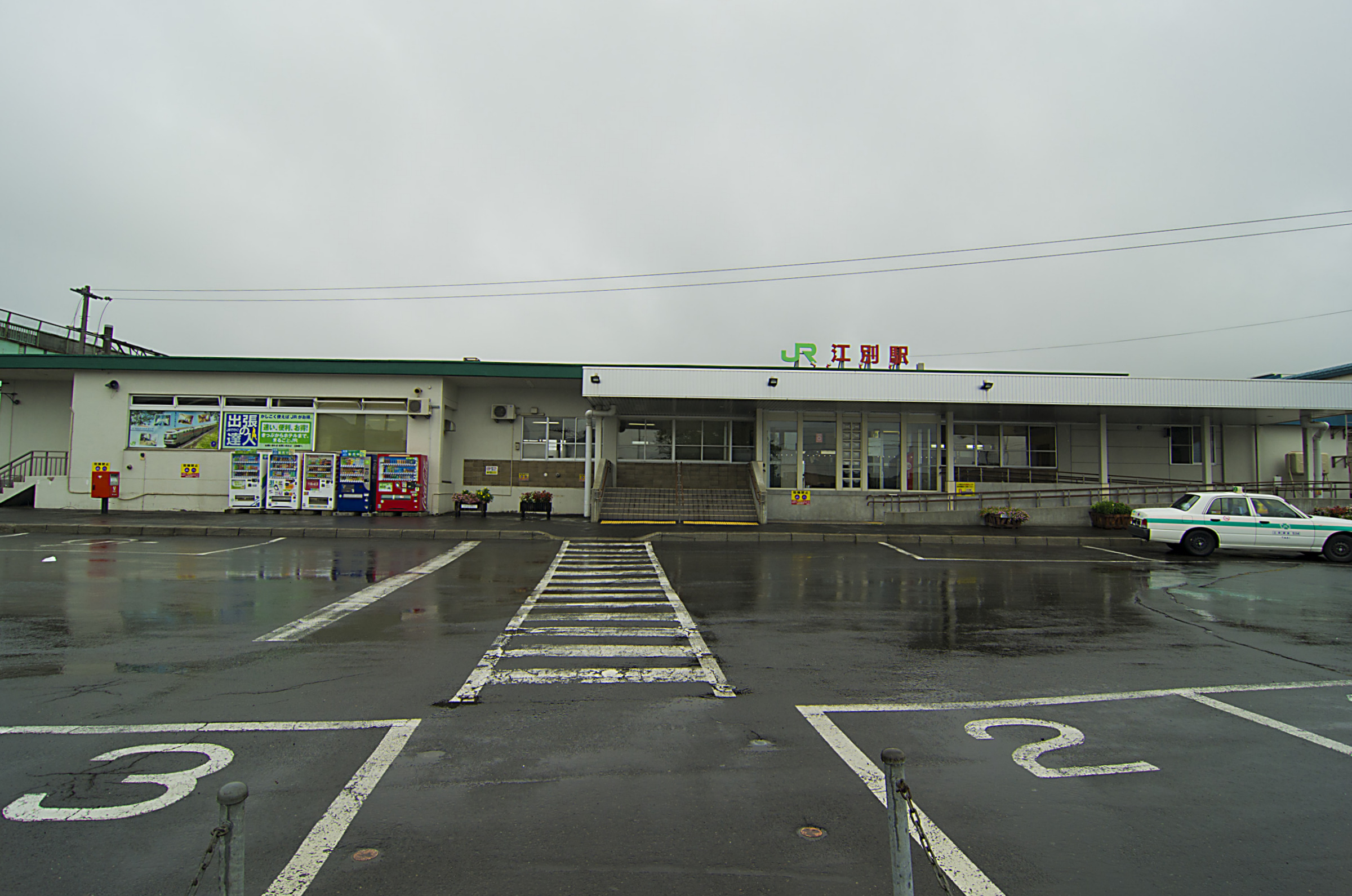 北海道旅客鉄道株式会社函館本線江別駅駅舎